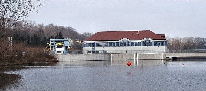 Kraftwerk Lambach